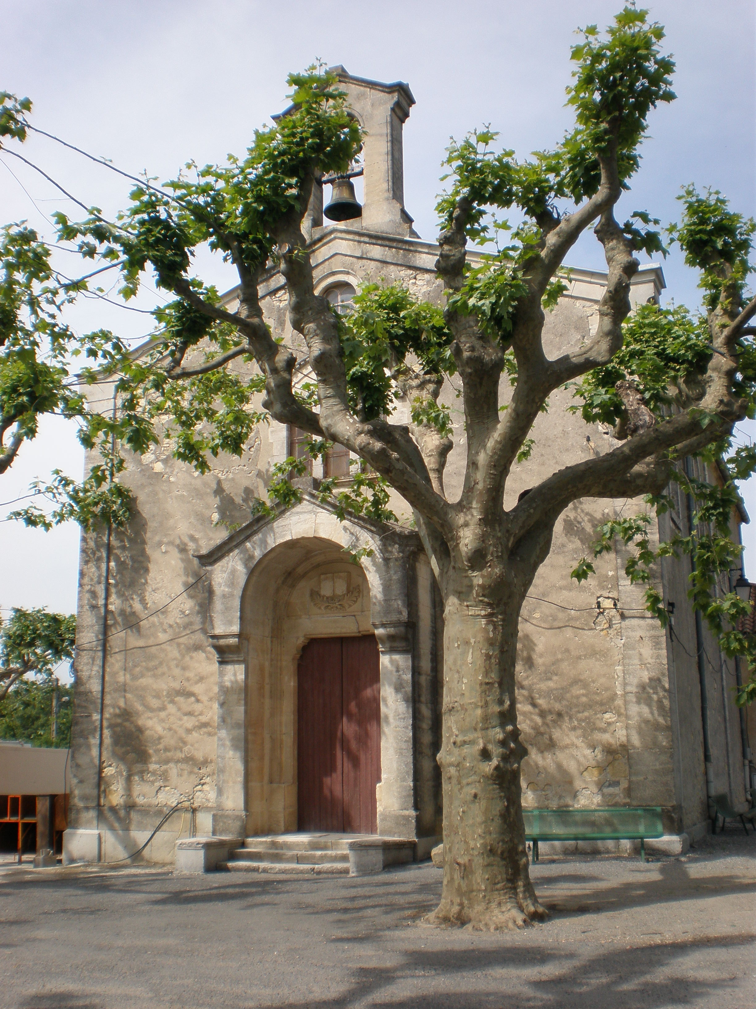 Eglise du village de Saint-Théodorit dans le Gard